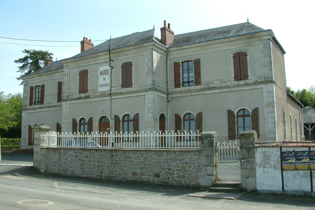 Mairie de Montchevrier